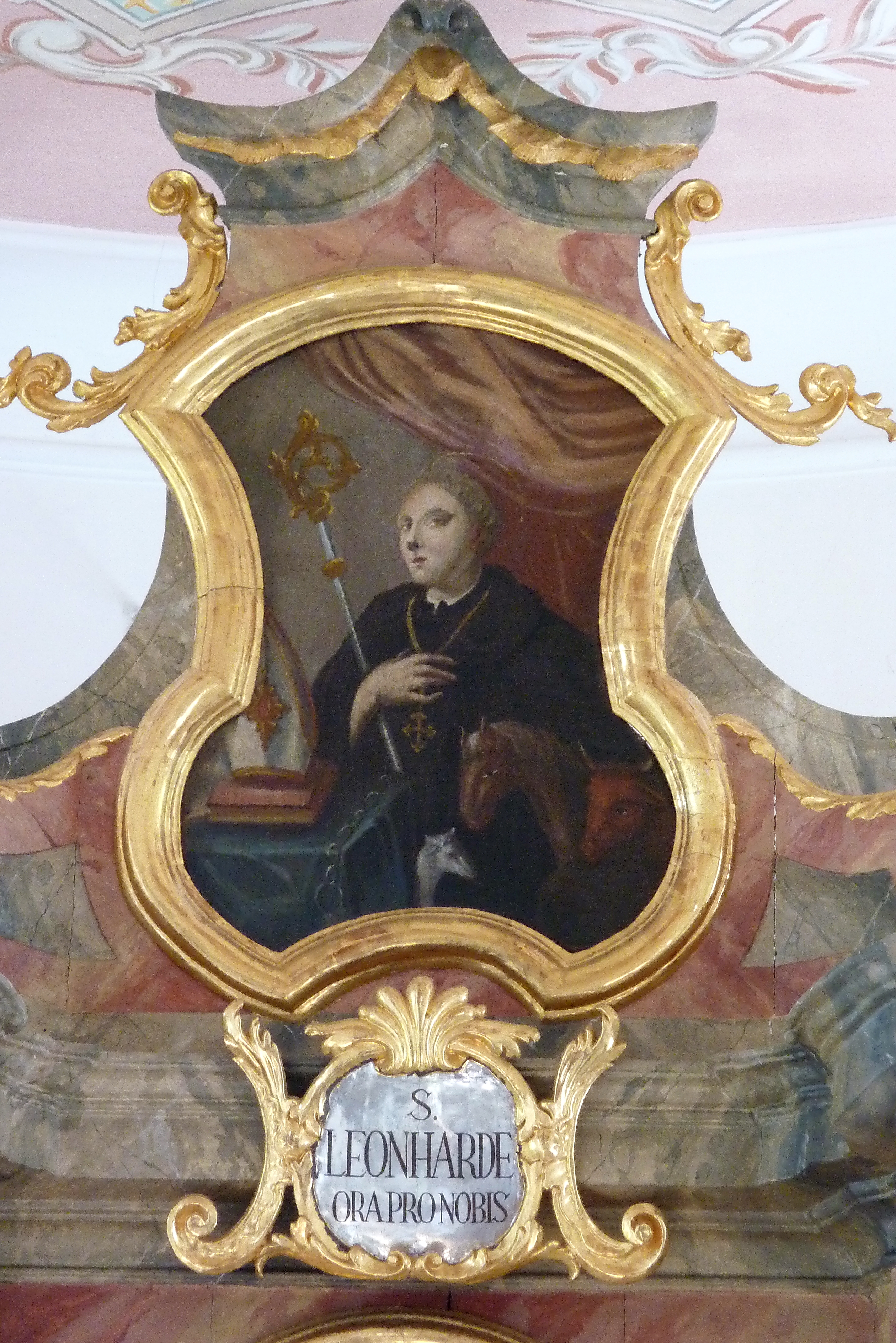 Katholische Filialkirche Hl. Dreifaltigkeit und St. Leonhard in Bocksberg, einem Ortsteil von Laugna im Landkreis Dillingen an der Donau (Bayern), Gemälde des hl. Leonhard im Auszugsbild des Hauptaltars, mit Abtsstab, Mitra und Tieren